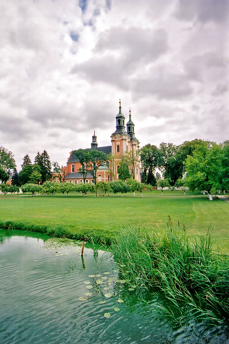 Goscikowo-Paradyz - klasztor.